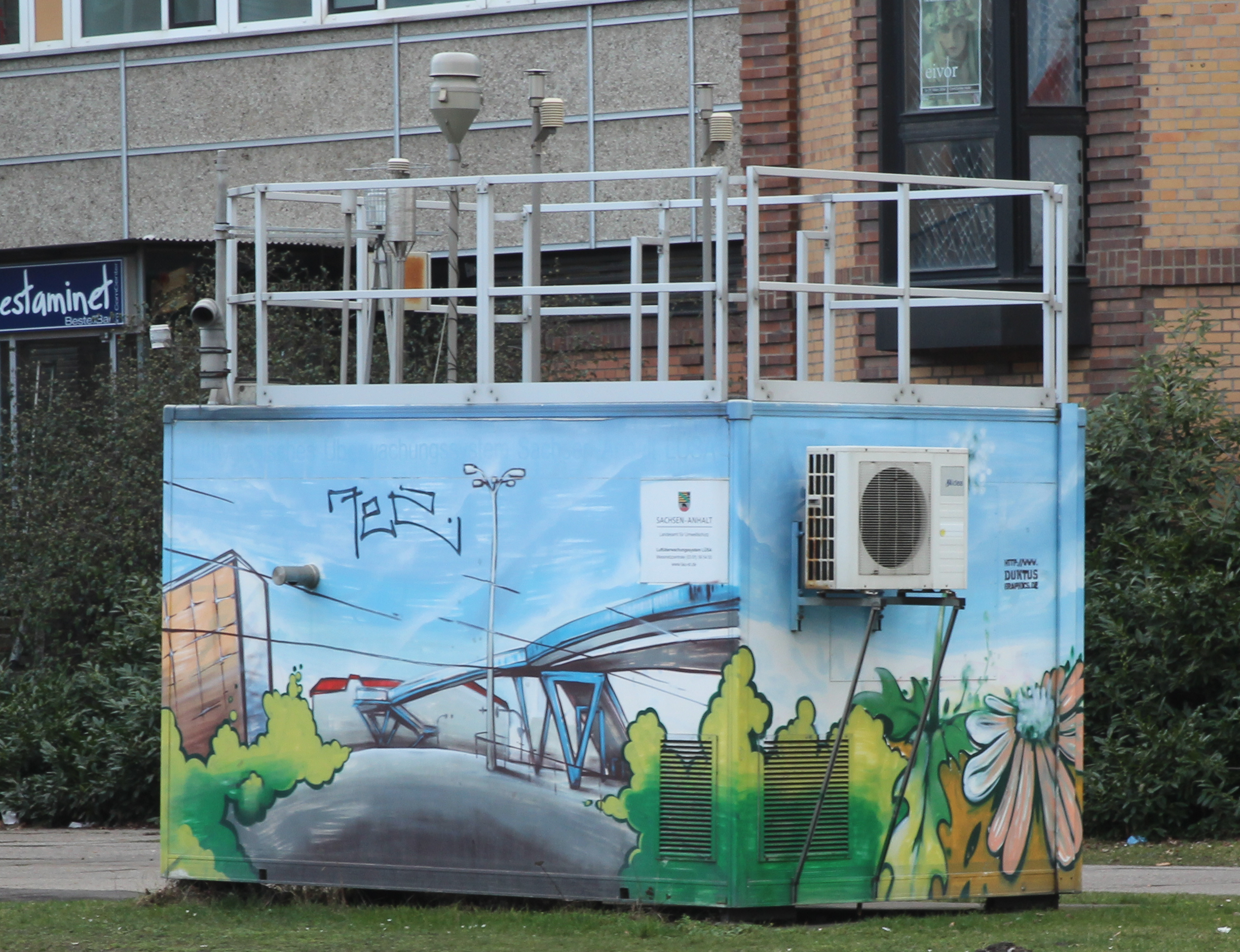 Streetart in Halle (Saale).